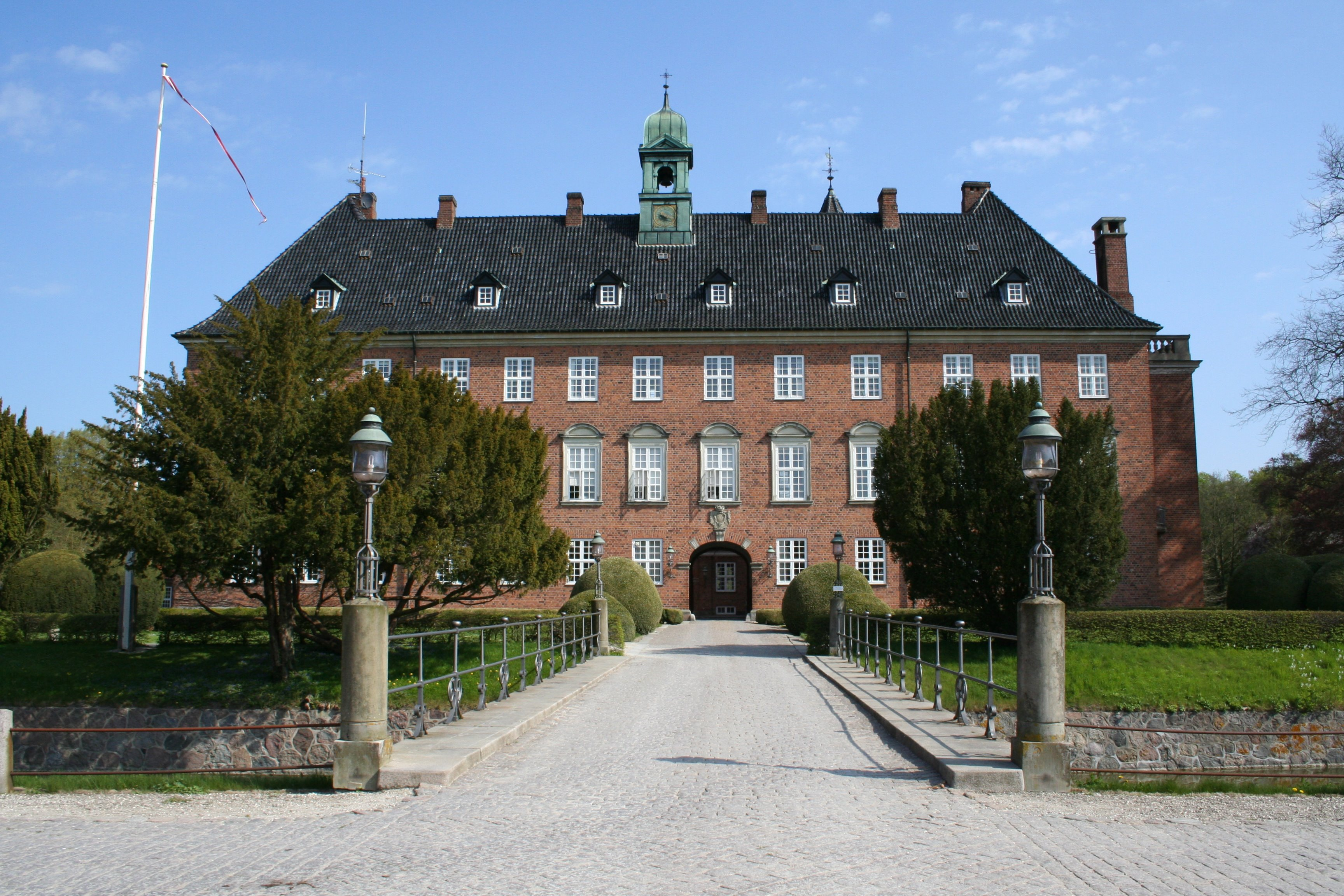 Vemmetofte Kloster 13-5-2006